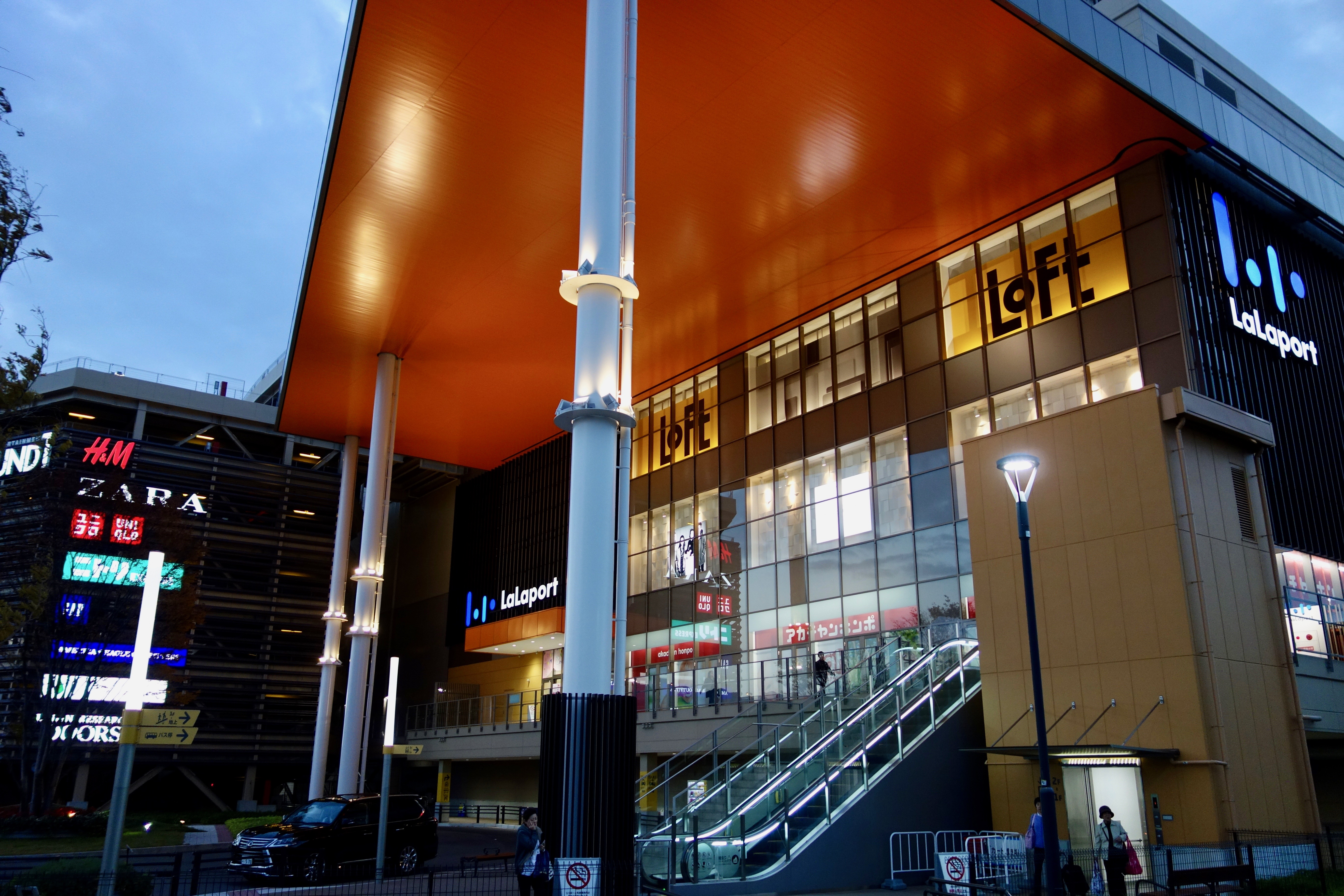 ららぽーと和泉 2階入り口